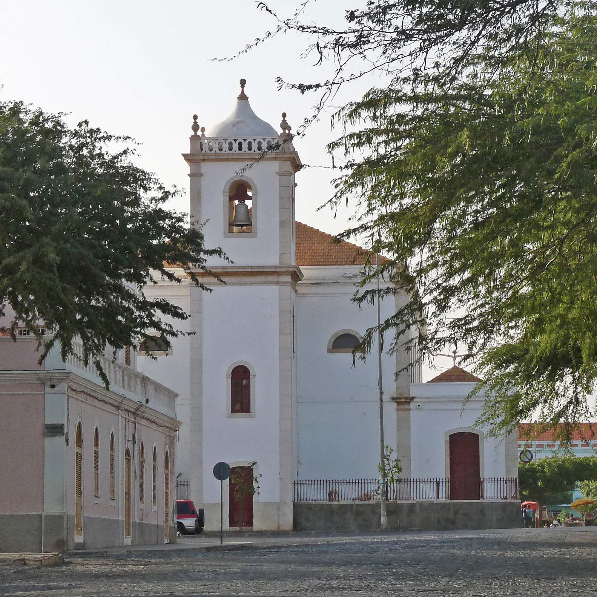 Praia (Cap-Vert) : église Nossa Senhora da Graça (Praia), côté choeur